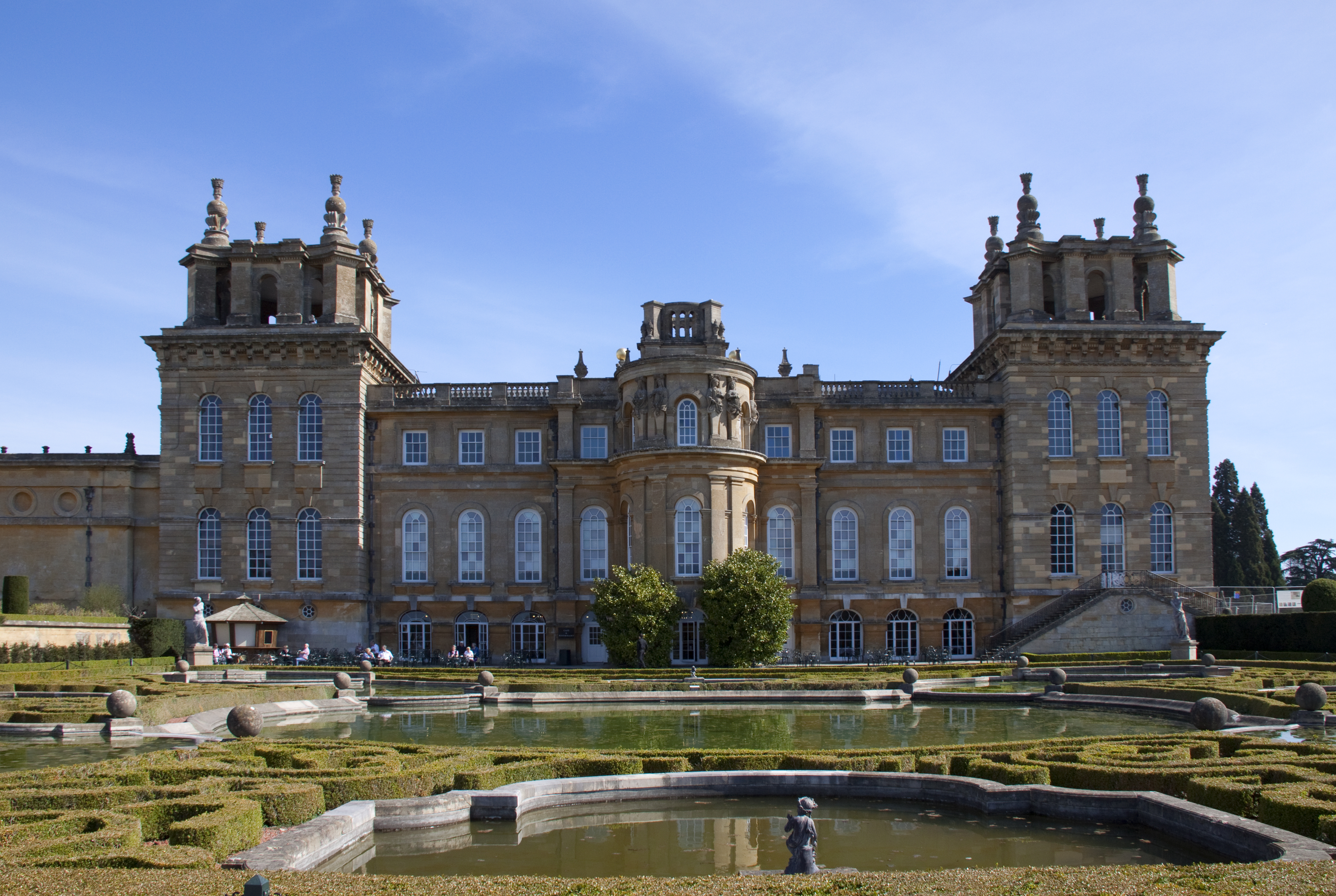 Blenheim Palace 5